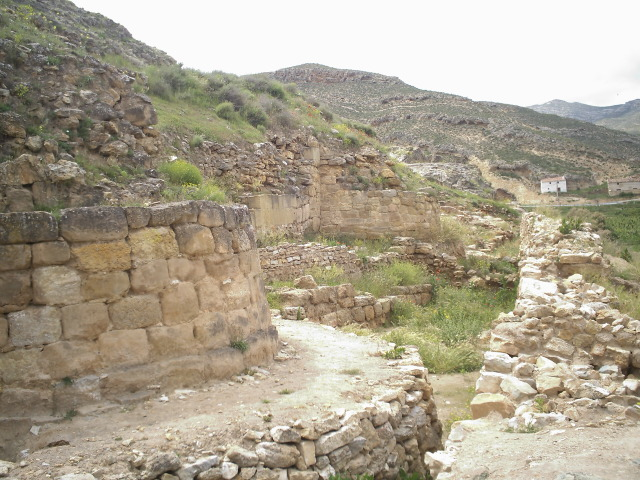 Contrebia Leukade Base de Torres.